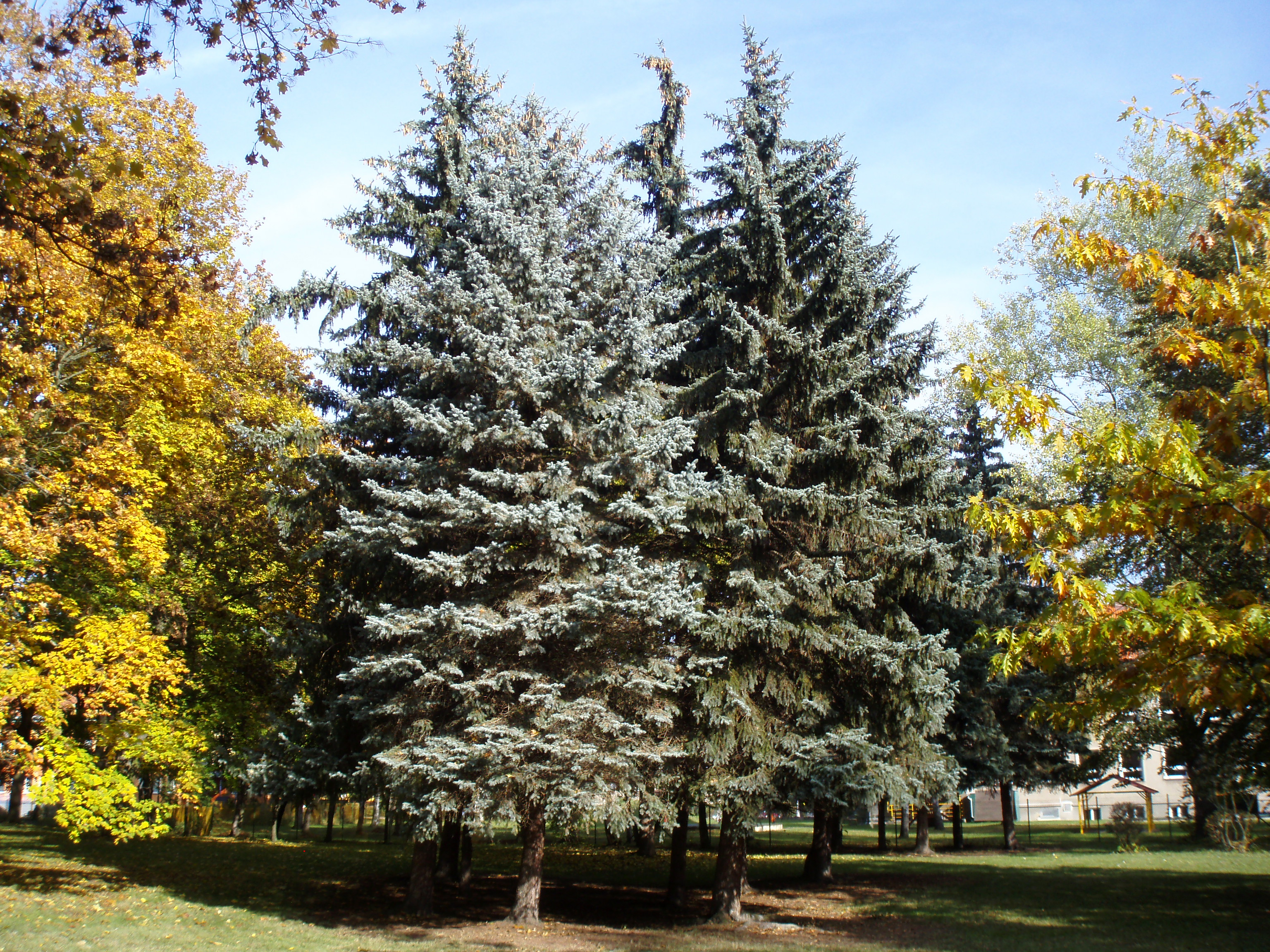 Kubištovy sady v Hradci Králové